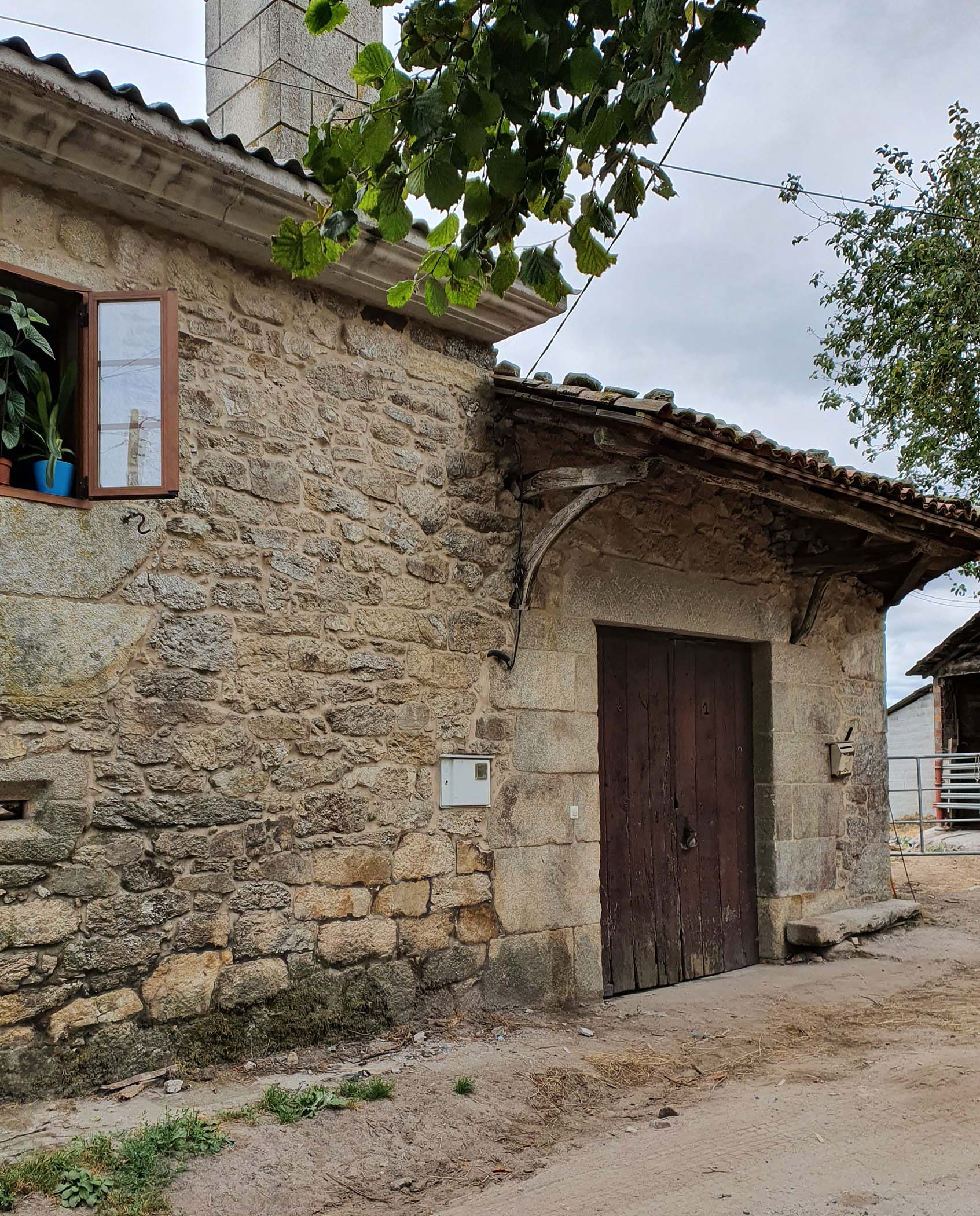 Cabo de Arcos, lugar da parroquia de Arcos, no concello de Antas de Ulla (Lugo). Detalle da portada de acceso a unha vivenda.